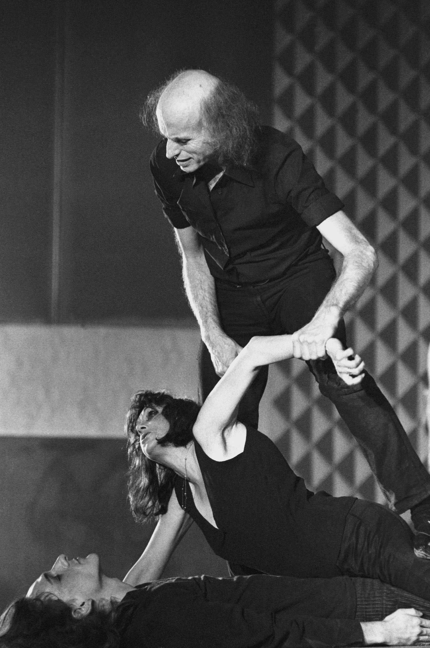 Julian Beck e Judith Malina, fondatori del Living Theatre di New York